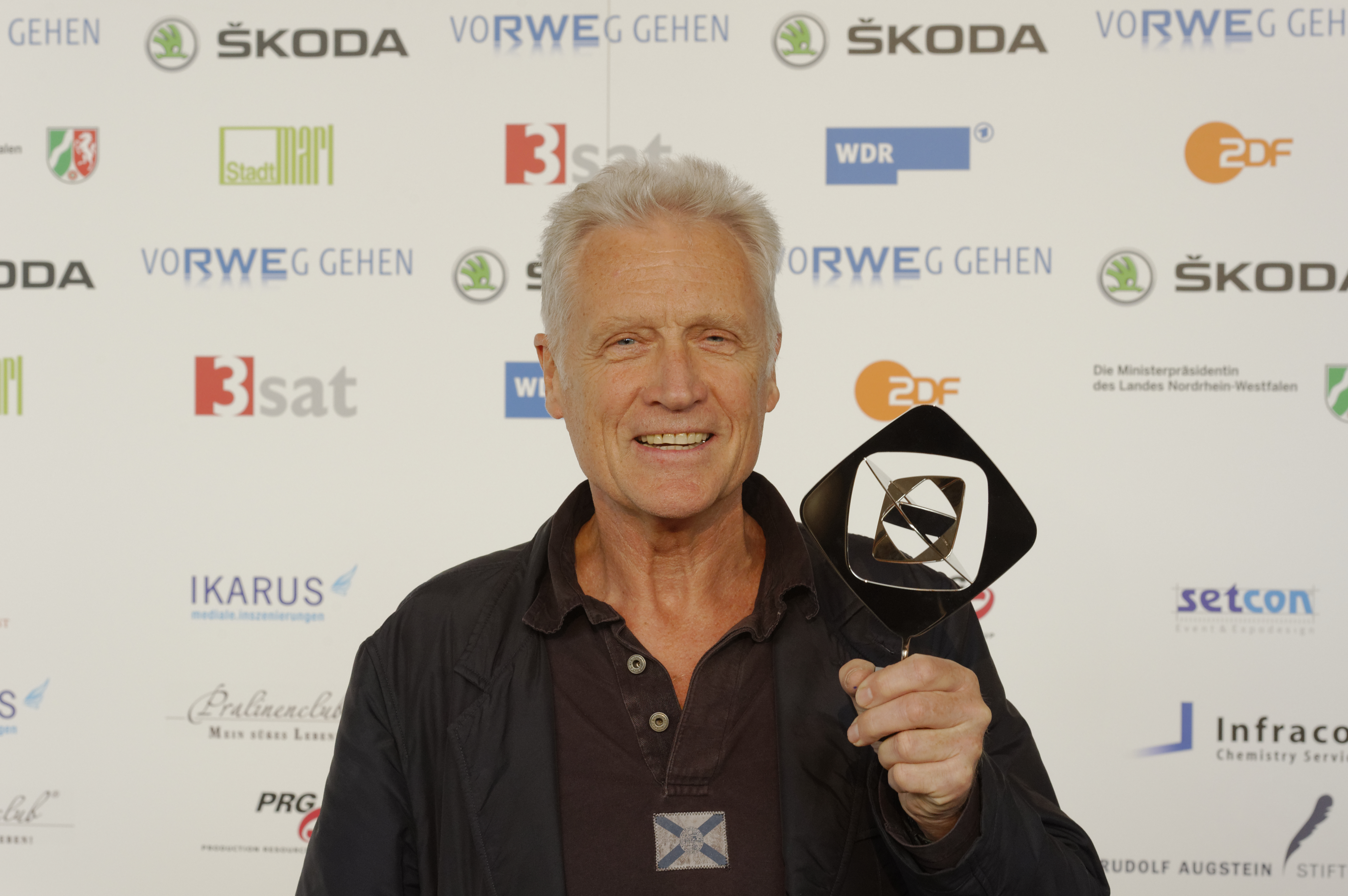 Grimme-Preis 2013 Pressekonferenz und Preisverleihung